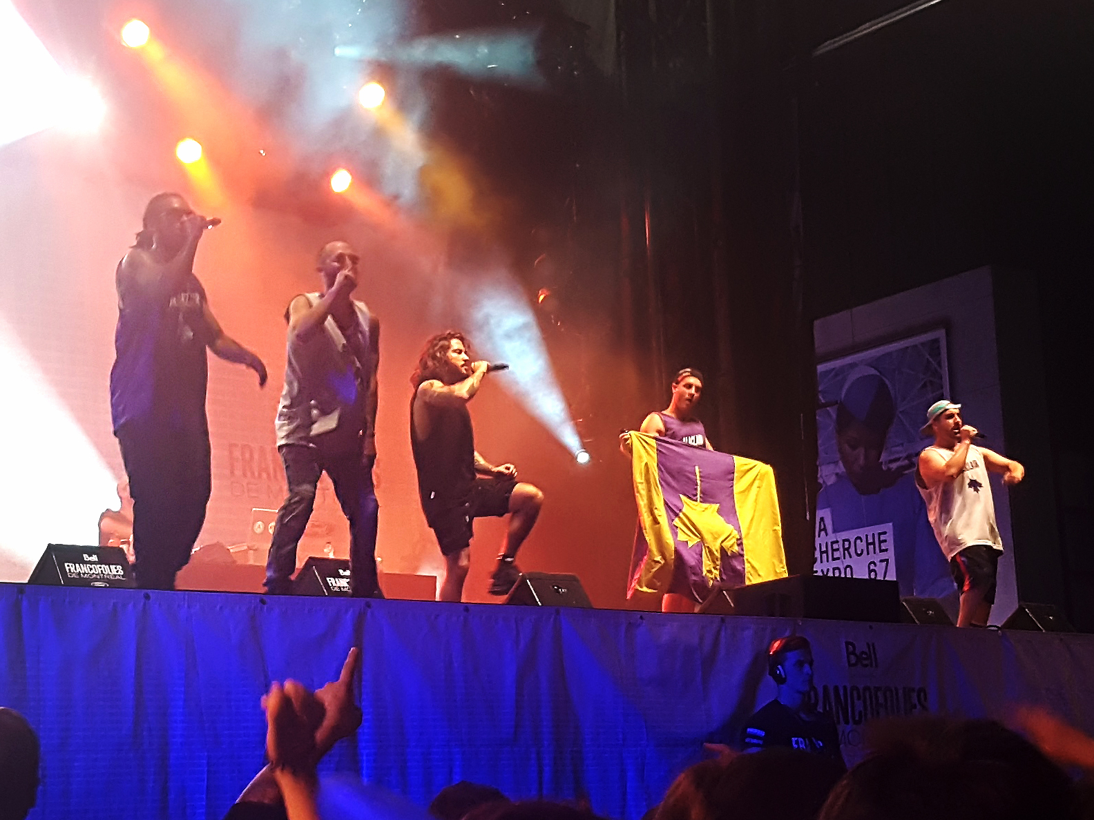 Alaclair Ensemble - FrancoFolies de Montréal - 06-17-2017. From left to right: KNLO, Eman, Claude Bégin, Ogden, Maybe Watson. FULL ALBUM